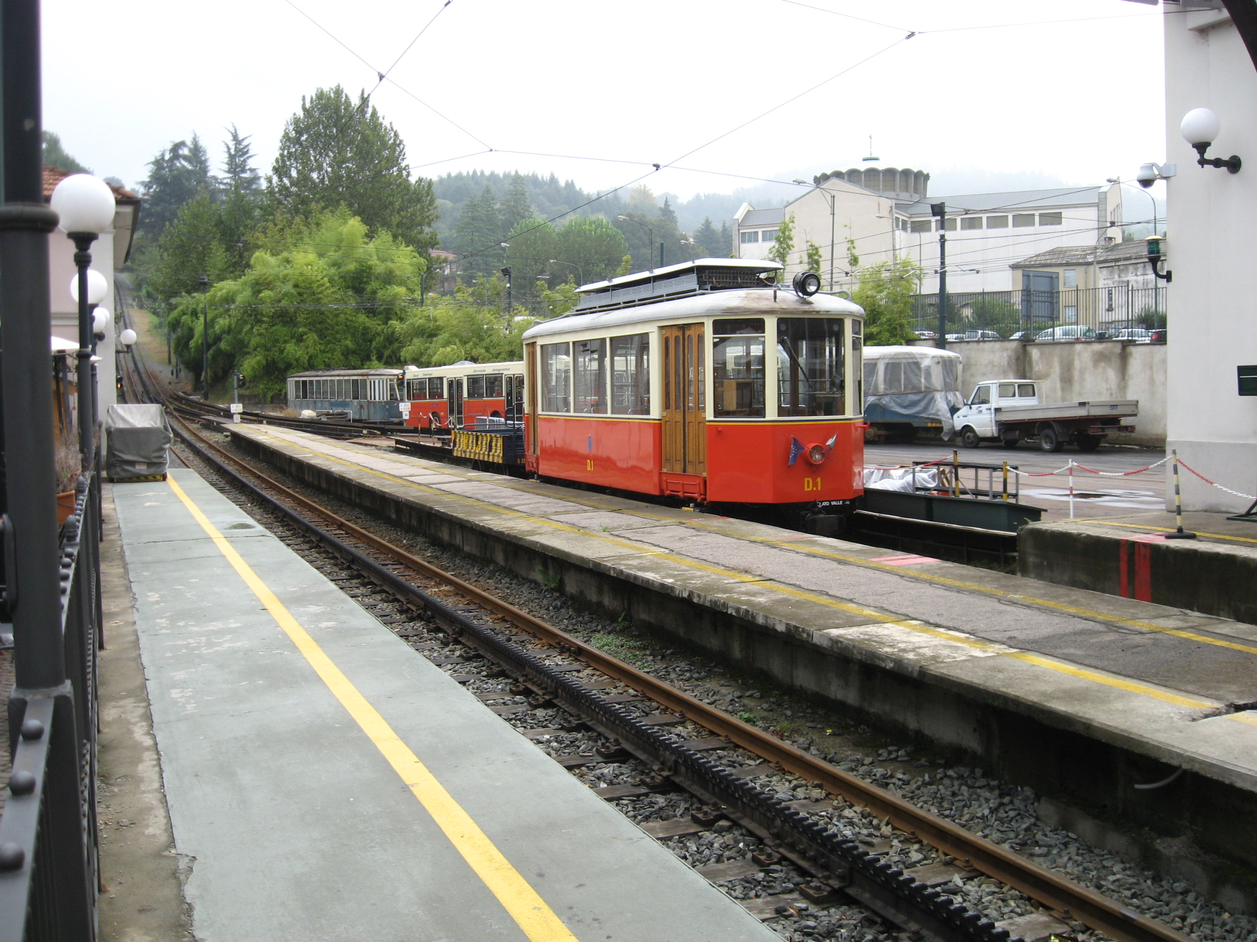 De tandradbaan Sassi Superga in Turijn